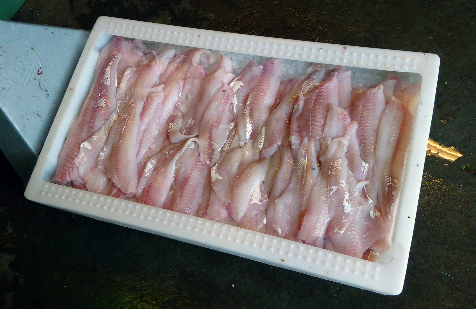 Torskfiléer, torsken fiskad söder om Ystad 13 dec 2017.